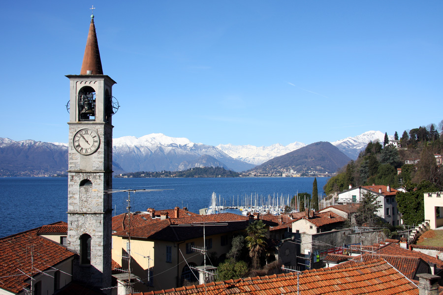 Panorama dal sagrato della chiesa nuova, Laveno-Mombello (VA). In primo piano il campanile della chiesa vecchia.